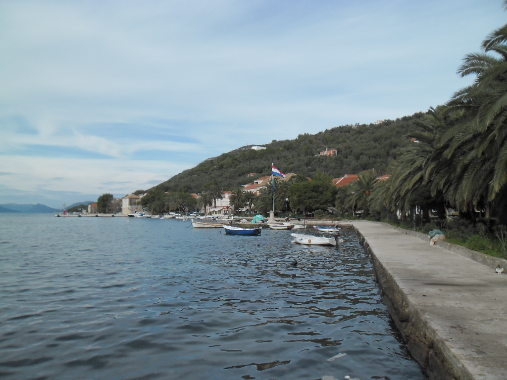 obala, Šipanska Luka